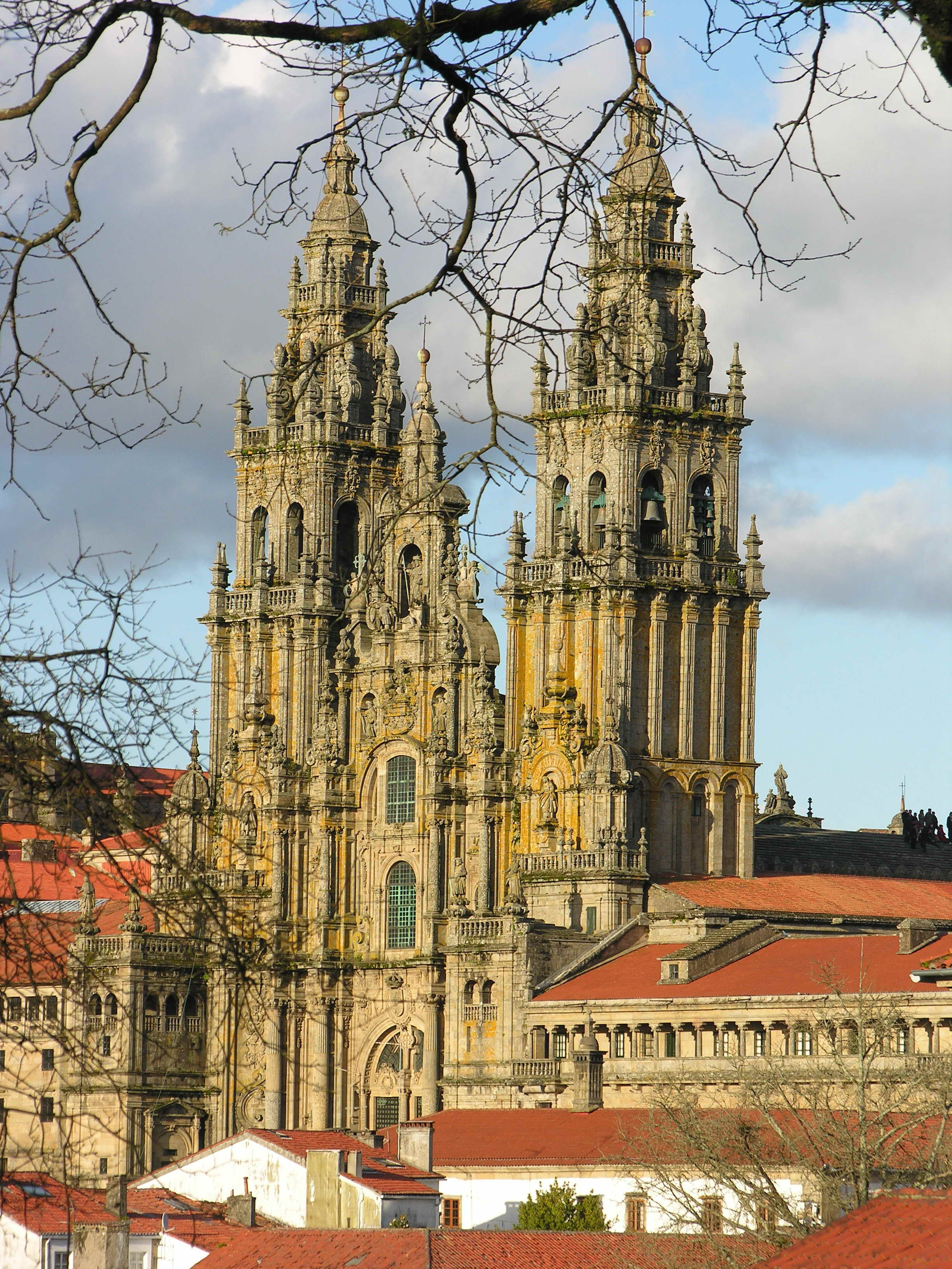 self made Galicia, Spain